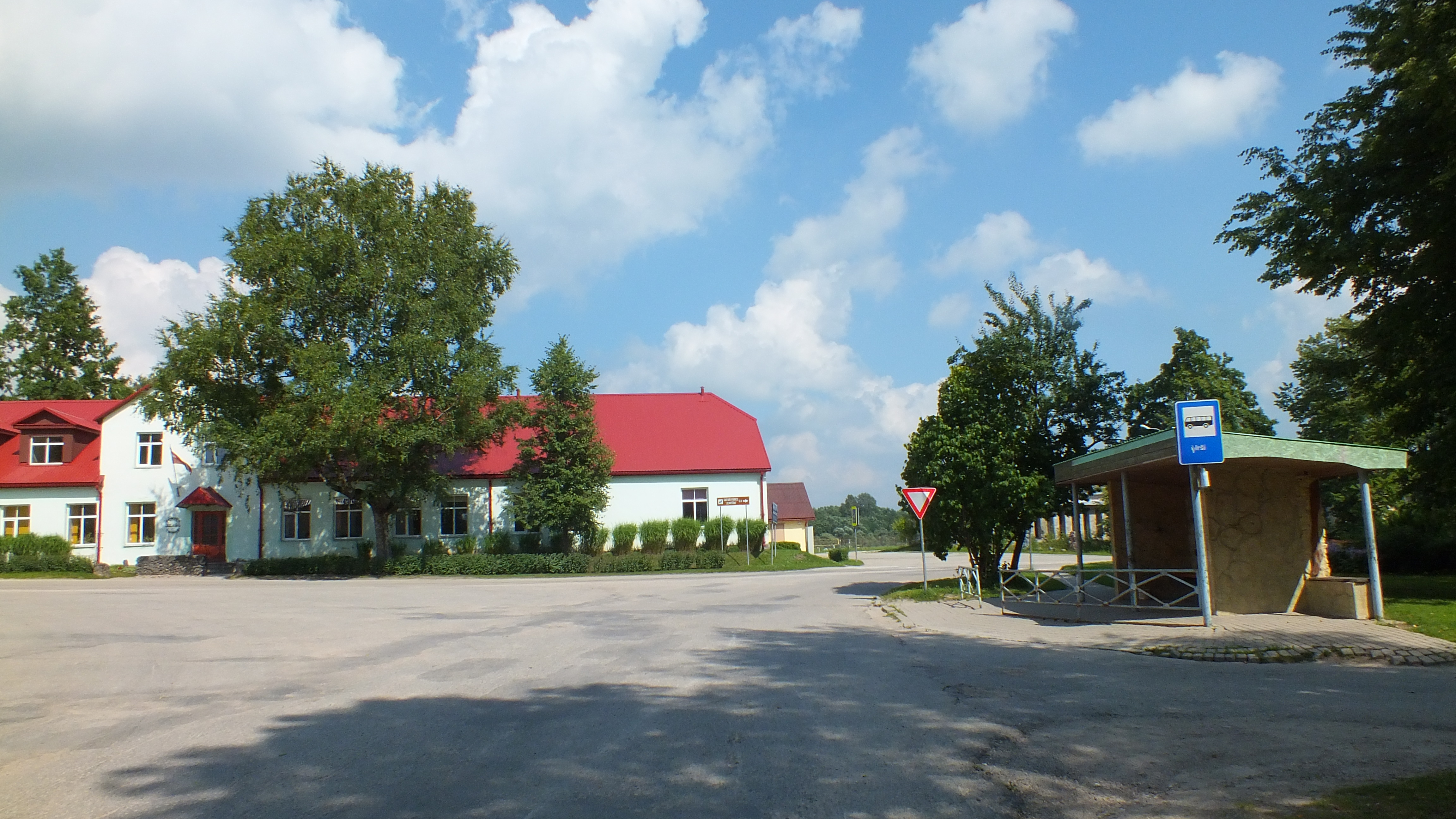 Iršu ciema centrā